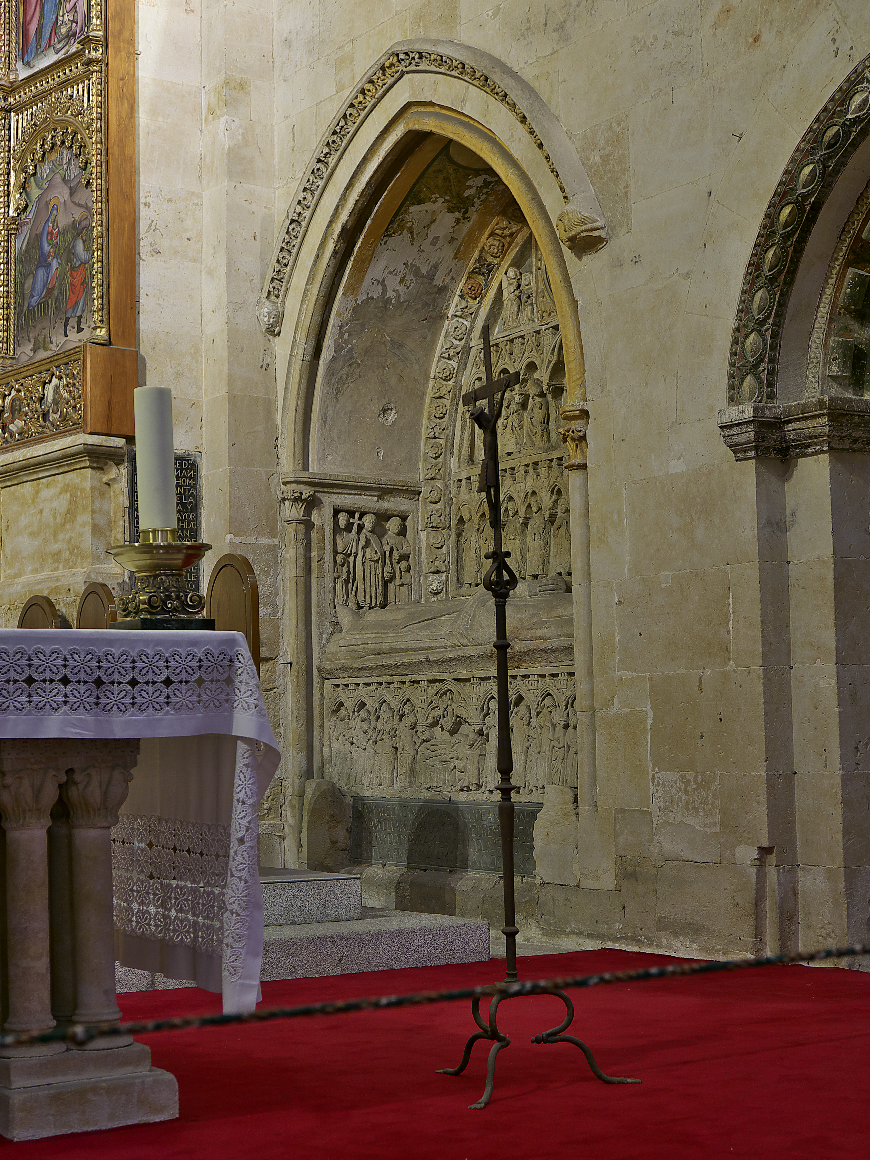 Capilla mayor de la catedral. Sepulcro de Fernando Alfonso de León (†1278), hijo natural de Alfonso IX de León y Maura, hermano de Fernando III el santo. Deán de la Catedral de Santiago, arcediano de Salamanca.